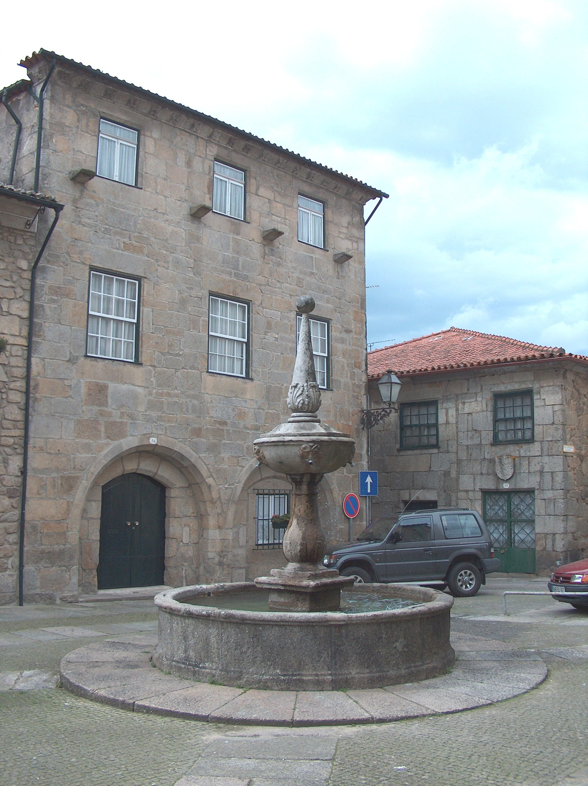 Largo do Apoio, em Barcelos, Portugal.